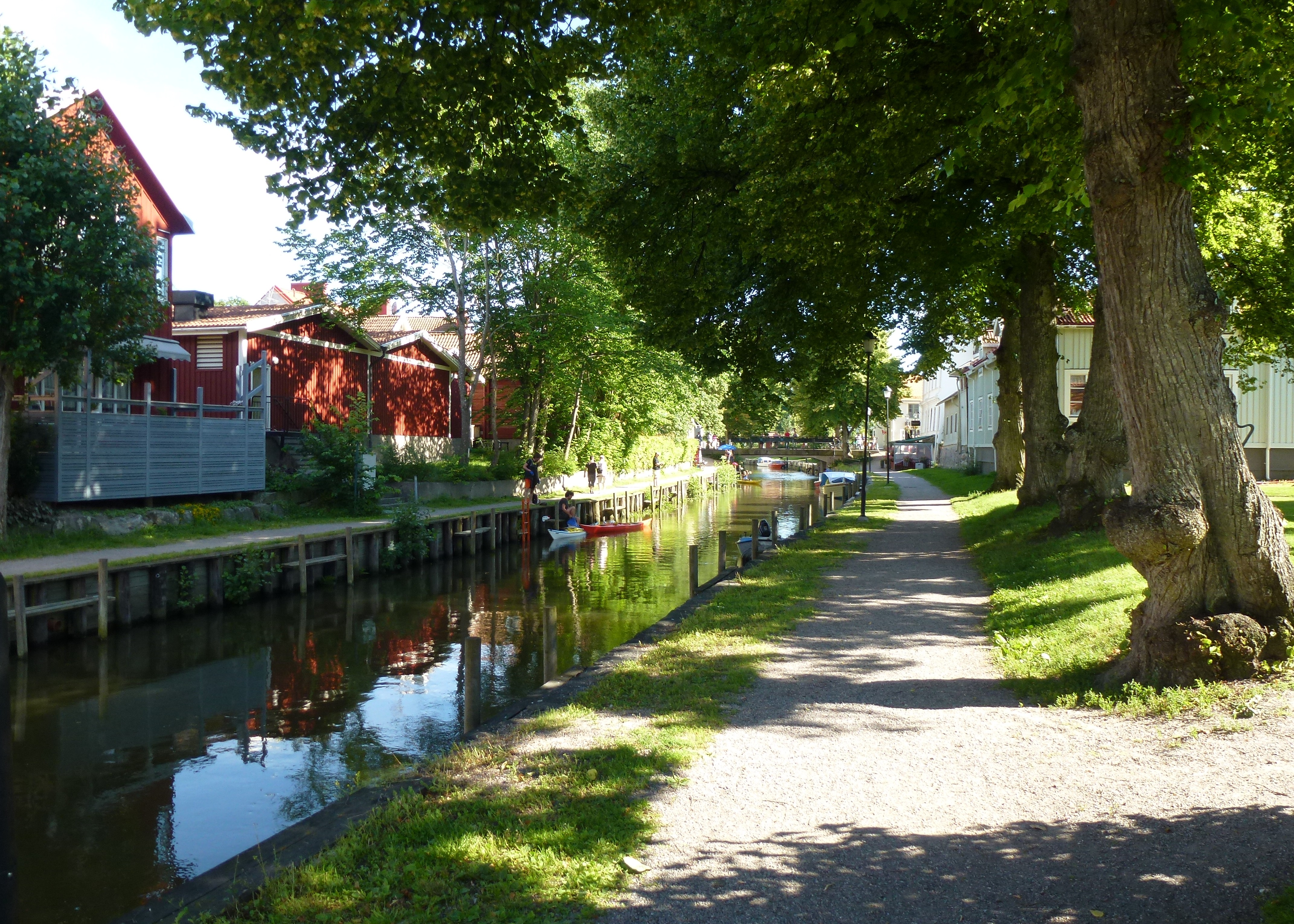 Trosaån